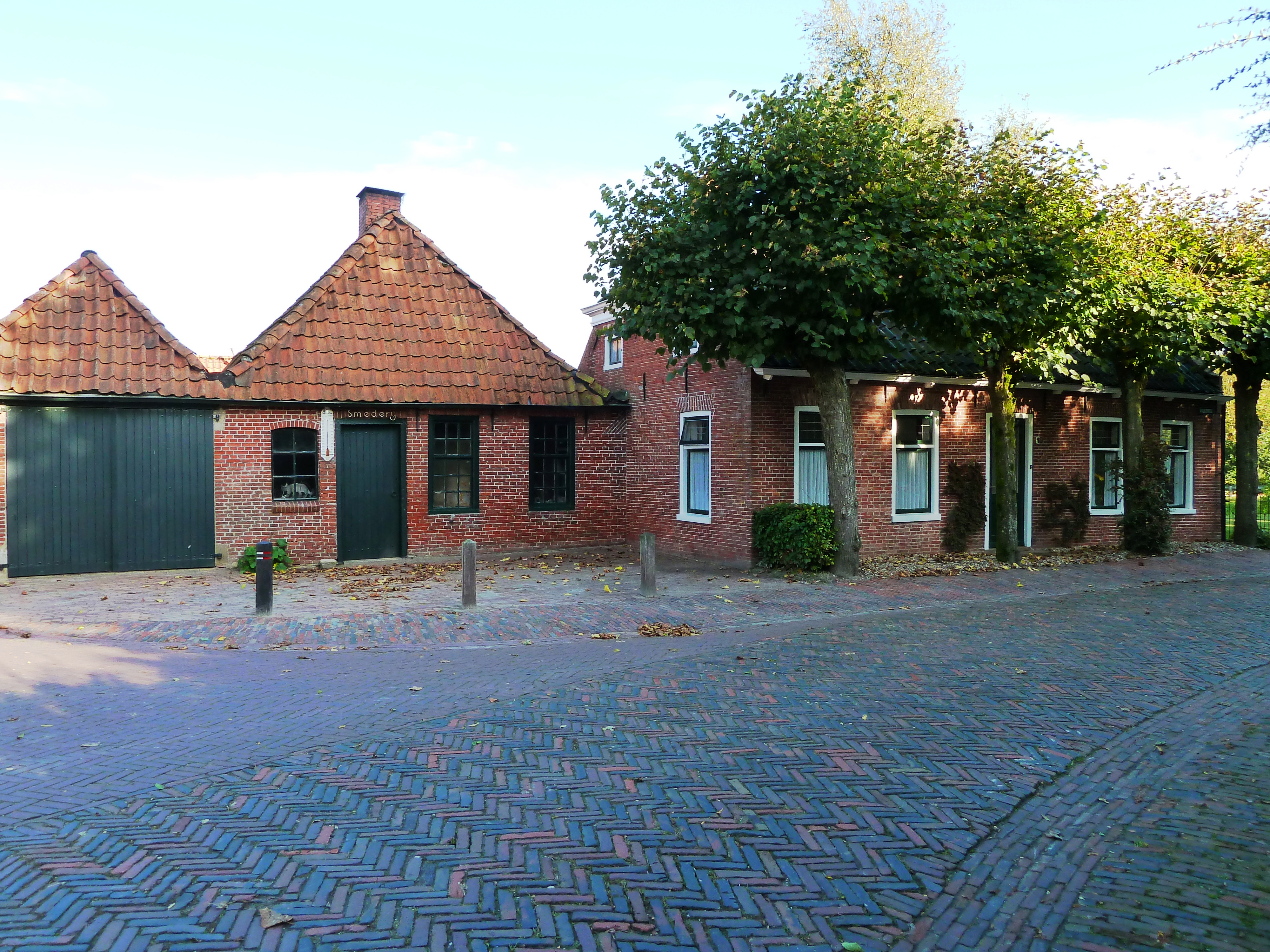 Oude smederij in Feerwerd (Groningen, Nederland).